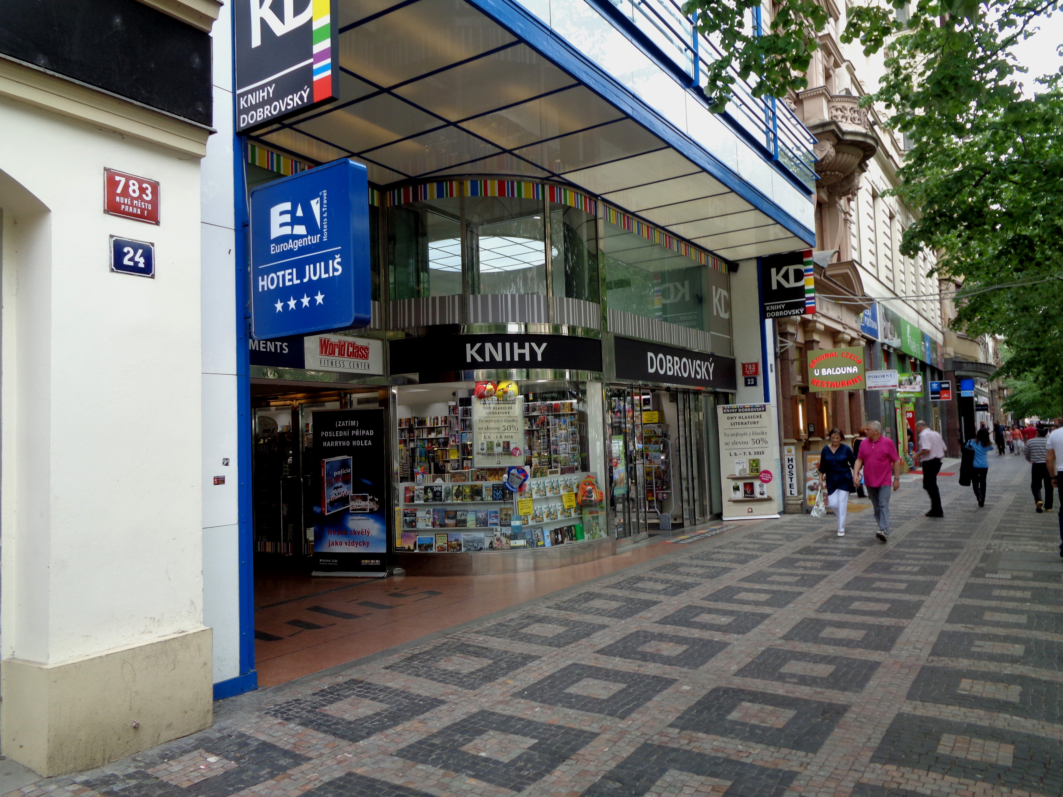 Pohled na bývalou cukrárnu Karla Juliše